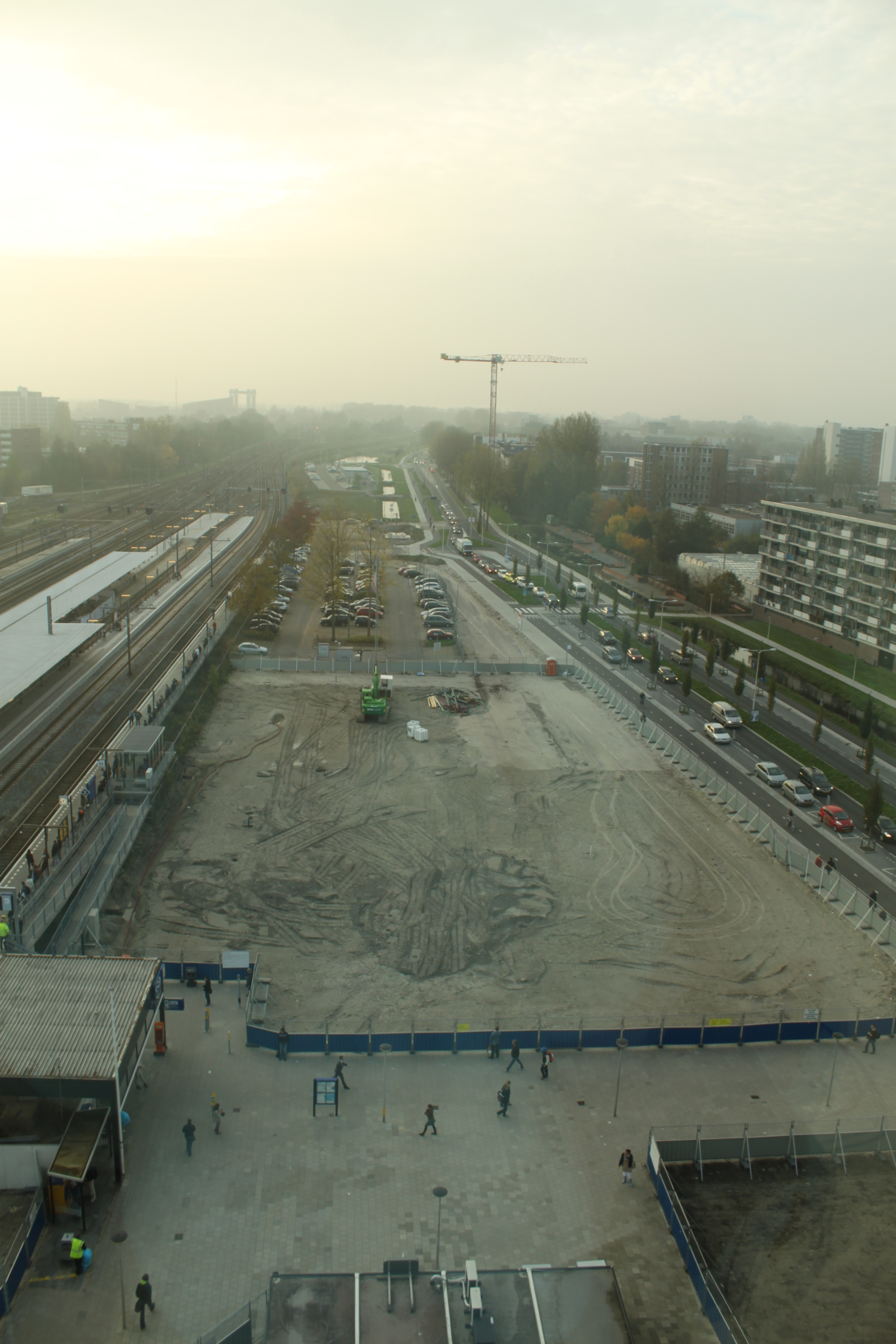 Overzichtsfoto van de Spoorzone, gezien vanuit het Huis van de Stad